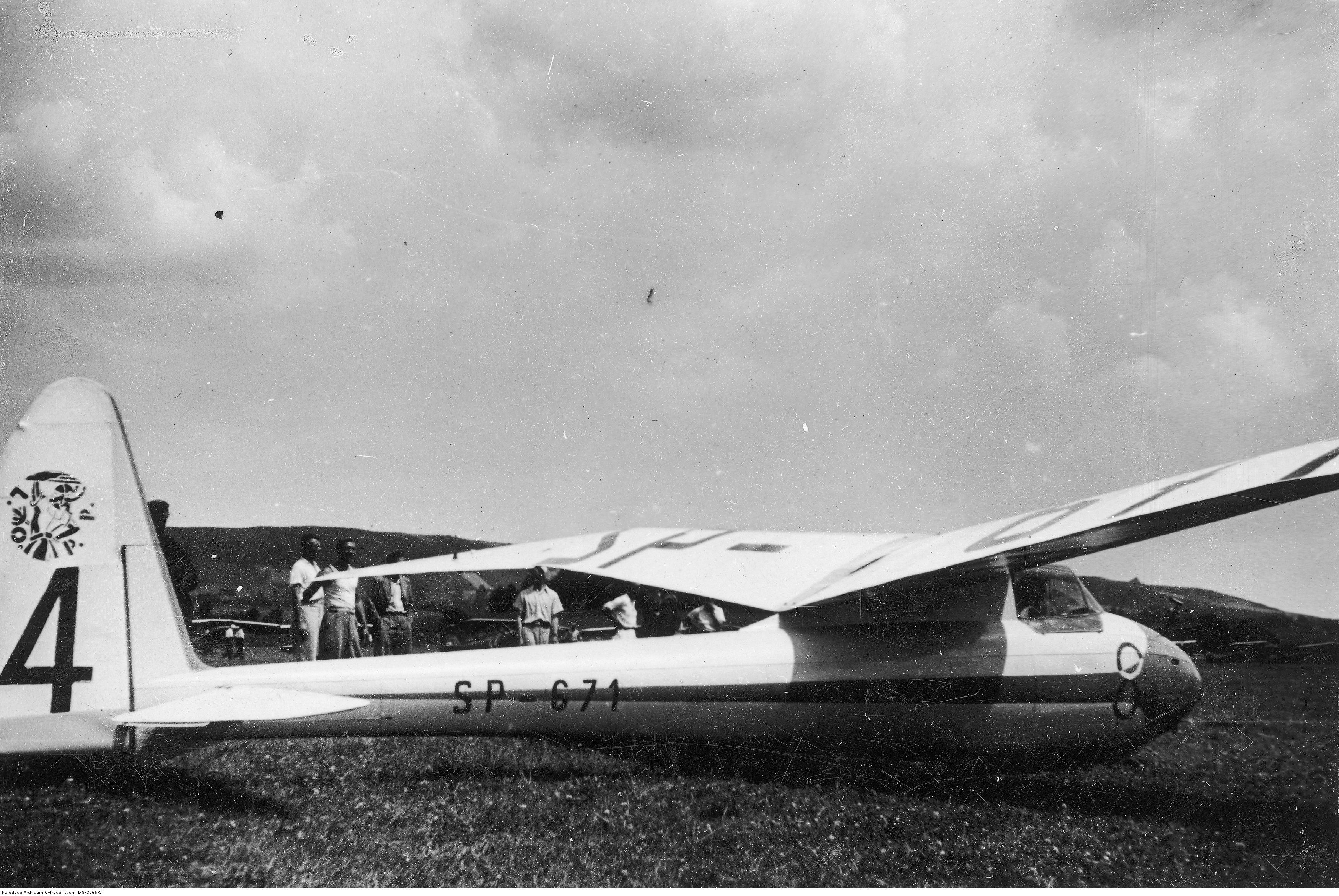 Szybowiec SG-3 bis/36 na lotnisku w Masłowie